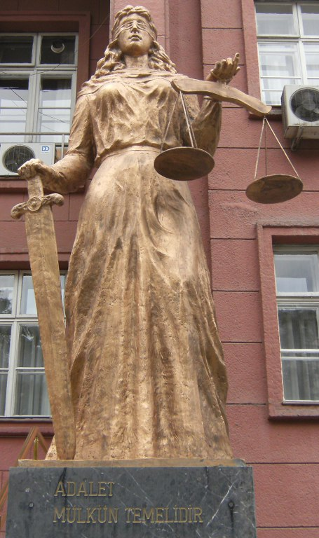 Ankara , Bakanlıklar semti Yargıtay binası önündeki heykel